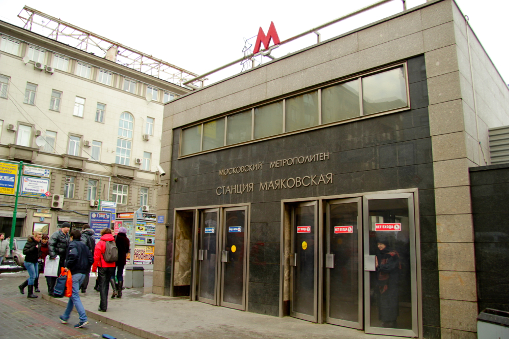 Zamoskvoretskaya Line (Замоскворецкая линия) Moscow Metro (Московский метрополитен)